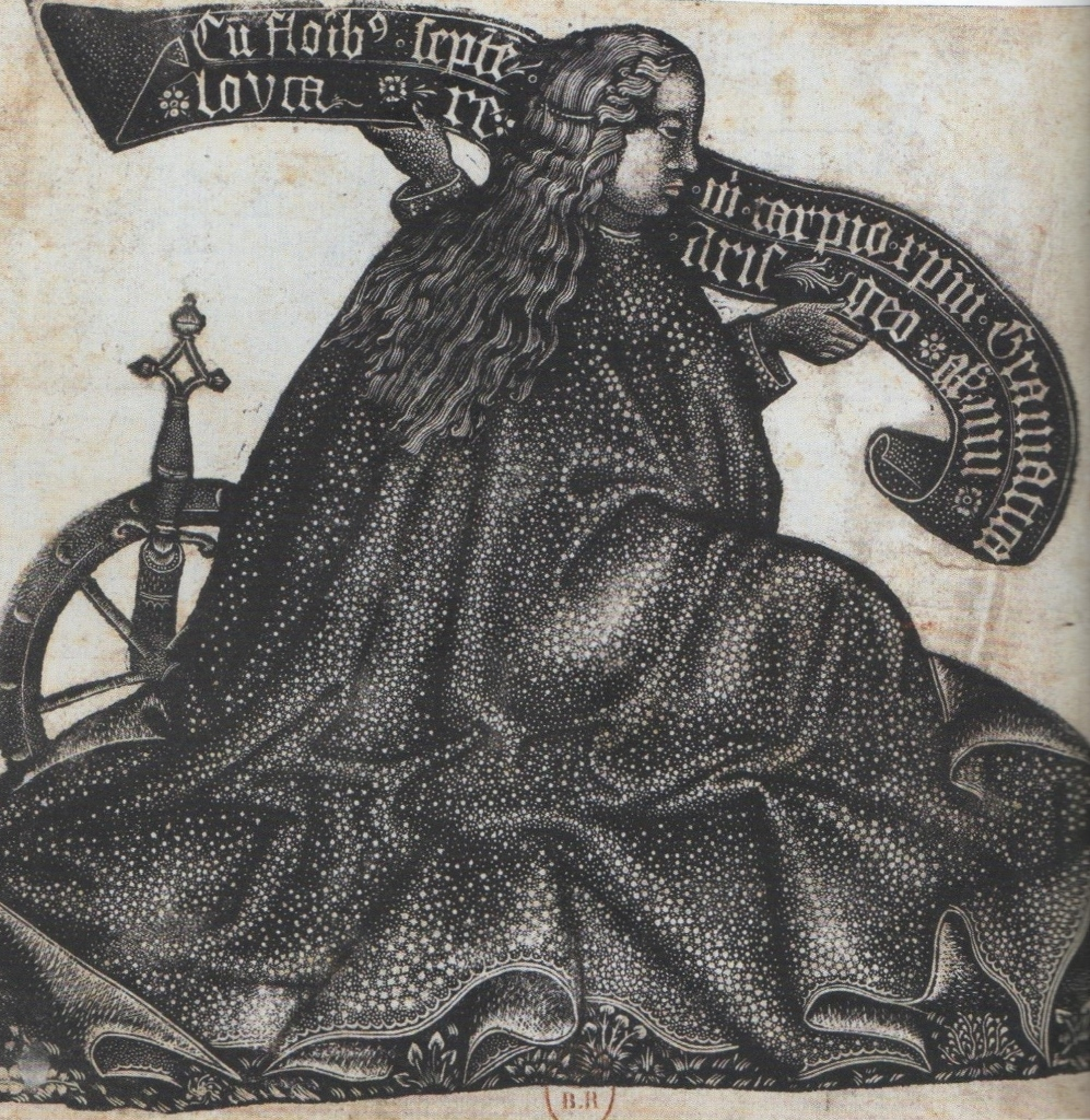 Anonyme, petite Sainte-Catherine, gravure en criblé, vers 1450-1460, BnF